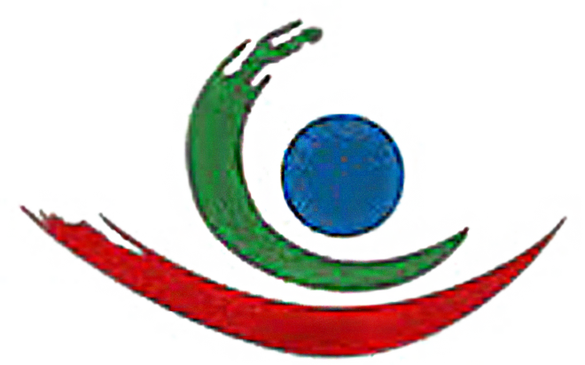 LOGO